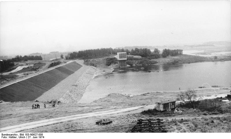 ADN-ZB/ Häßler/ 27.6.1974/Bez. Dresden: Probestau an der Talsperre Bautzen begann. An der neuerrichteten Brauchwassertalsperre Bautzen begann zwei Wochen vor dem geplanten Termin der Probestau. Der in einem landschaftlich reizvollen Winkel gelegene künstliche See wird vor allem der Brauchwasserversorgung des Kraftwerkes Boxberg sowie dem Hochwasserschutz und der Mehrzwecknutzung für die Binnenschifferei, der Landwirtschaft und als Naherholungsgebiet dienen. Auf einer Fläche von etwa 500 Hektar werden insgesamt 40 Millionen Kubikmeter Wasser gestaut.